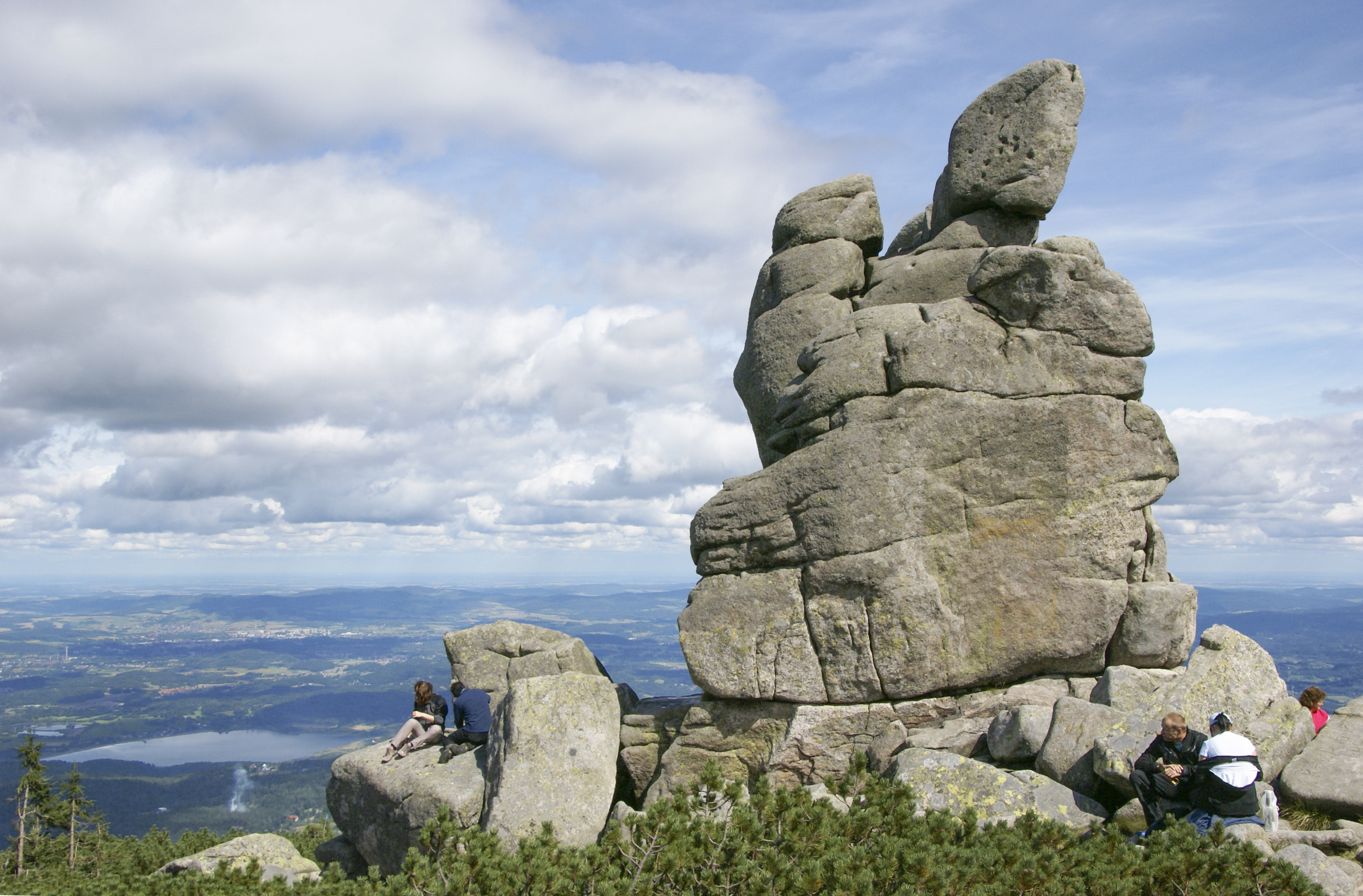 Słonecznik – formacja skalna w Sudetach Zachodnich, w paśmie Karkonoszy, na terenie Gminy Podgórzyn. W dole - zbiornik Sosnówka.